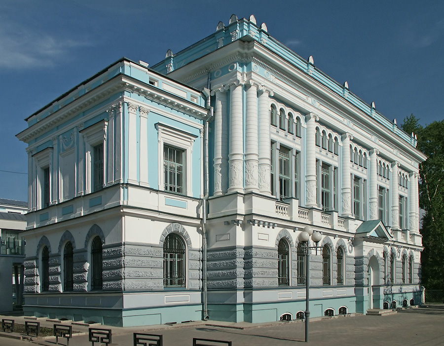 Здание Библиотеки научной Томского университета (Томская область, Томск, Ленина проспект, 34-а)